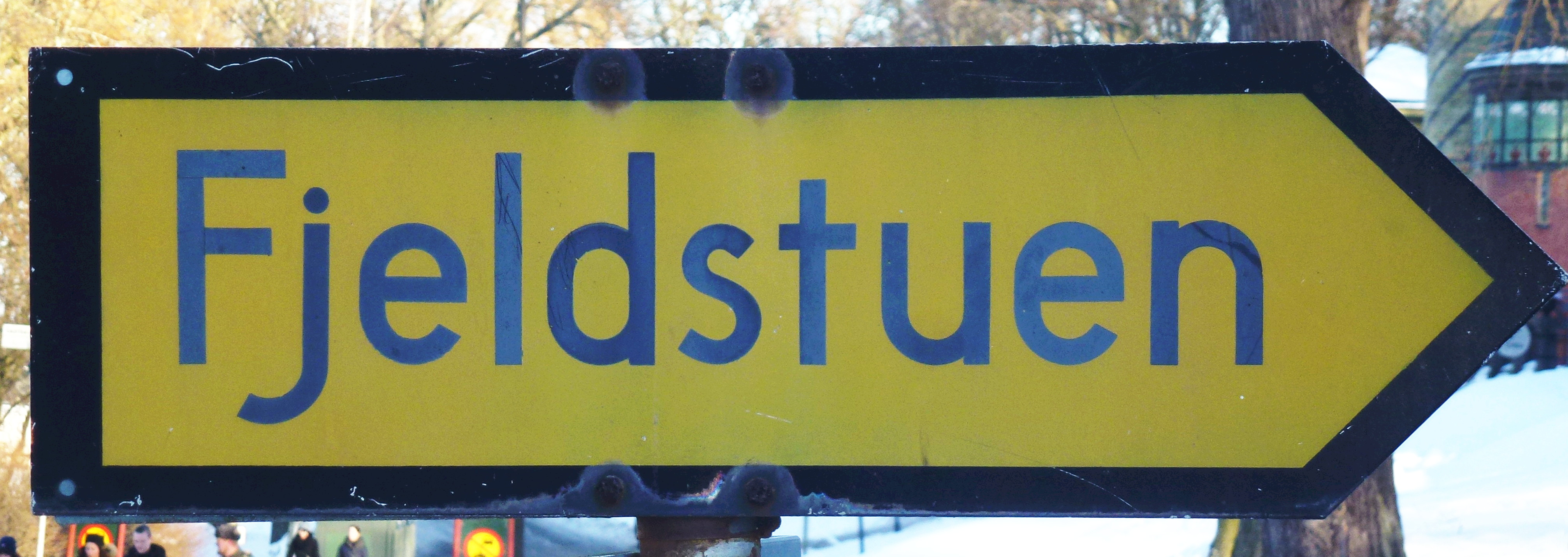 Villa Fjeldstuen skylt